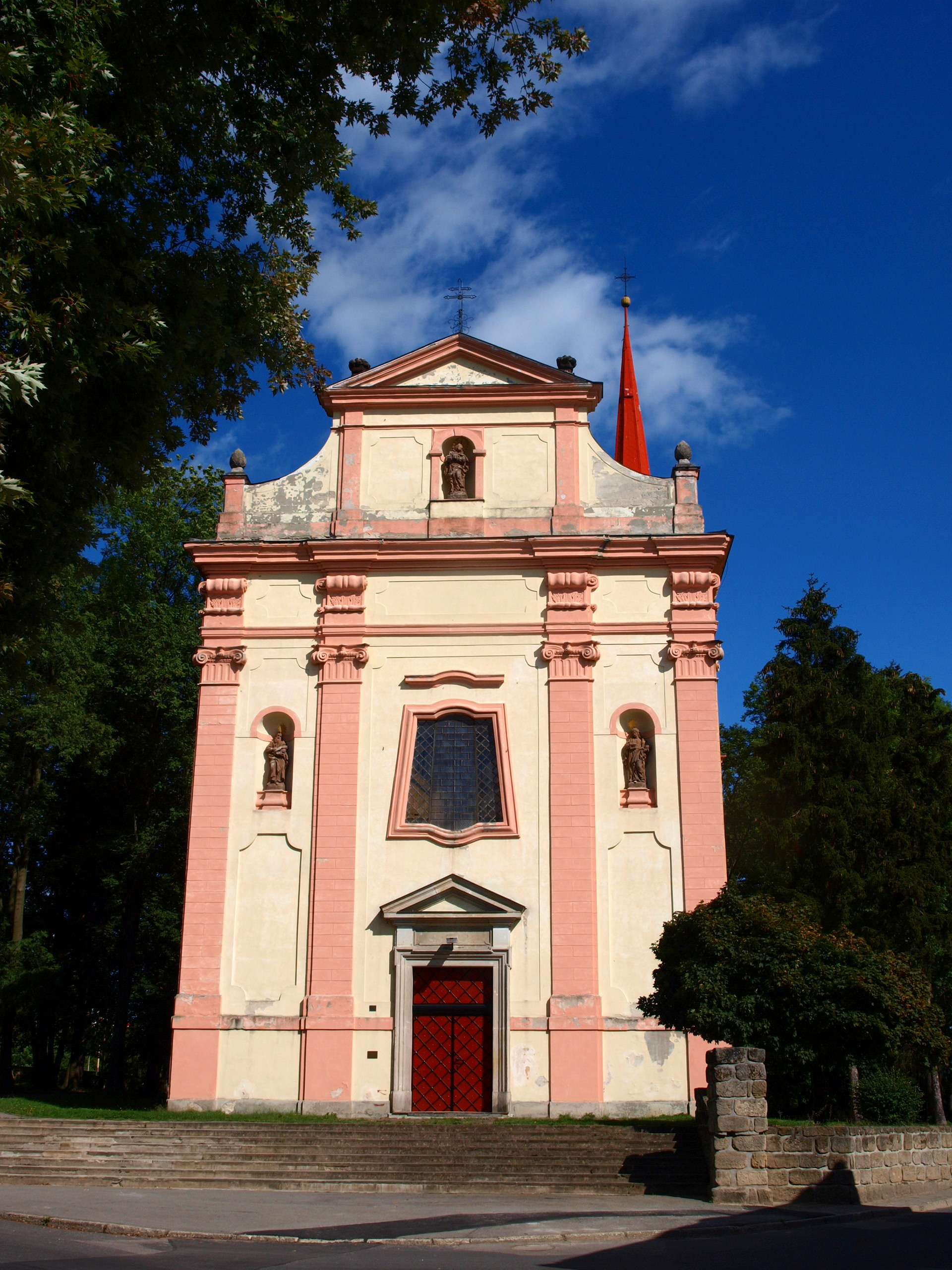 Česká Lípa